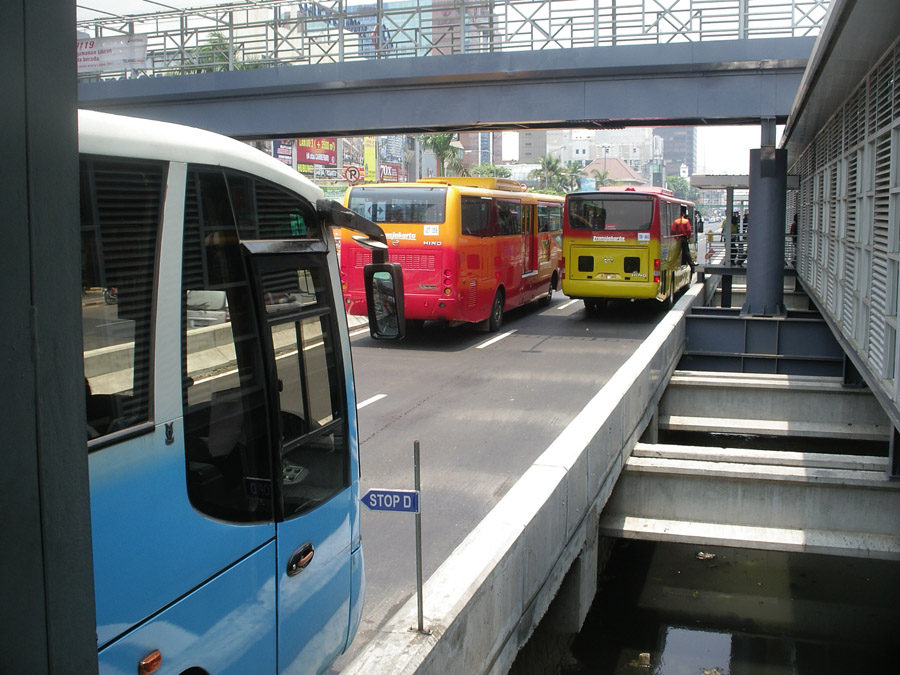 Busse am zentralen Umsteigepunkt Harmoni, der über einem der Kanäle Jakartas aufgebaut wurde. Zu sehen sind auch die derzeitigen drei Farblackierungen der Busse.